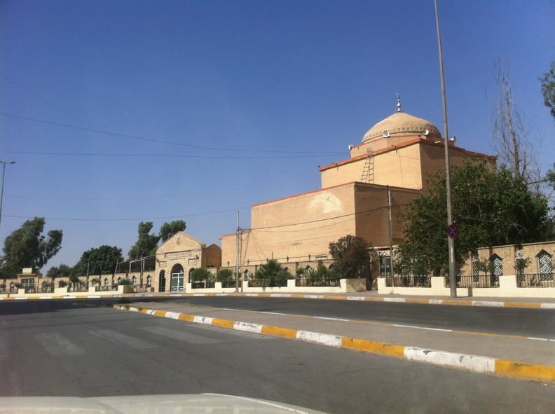 جامع الخضر عام ٢٠١١ من جهة شارع حلب